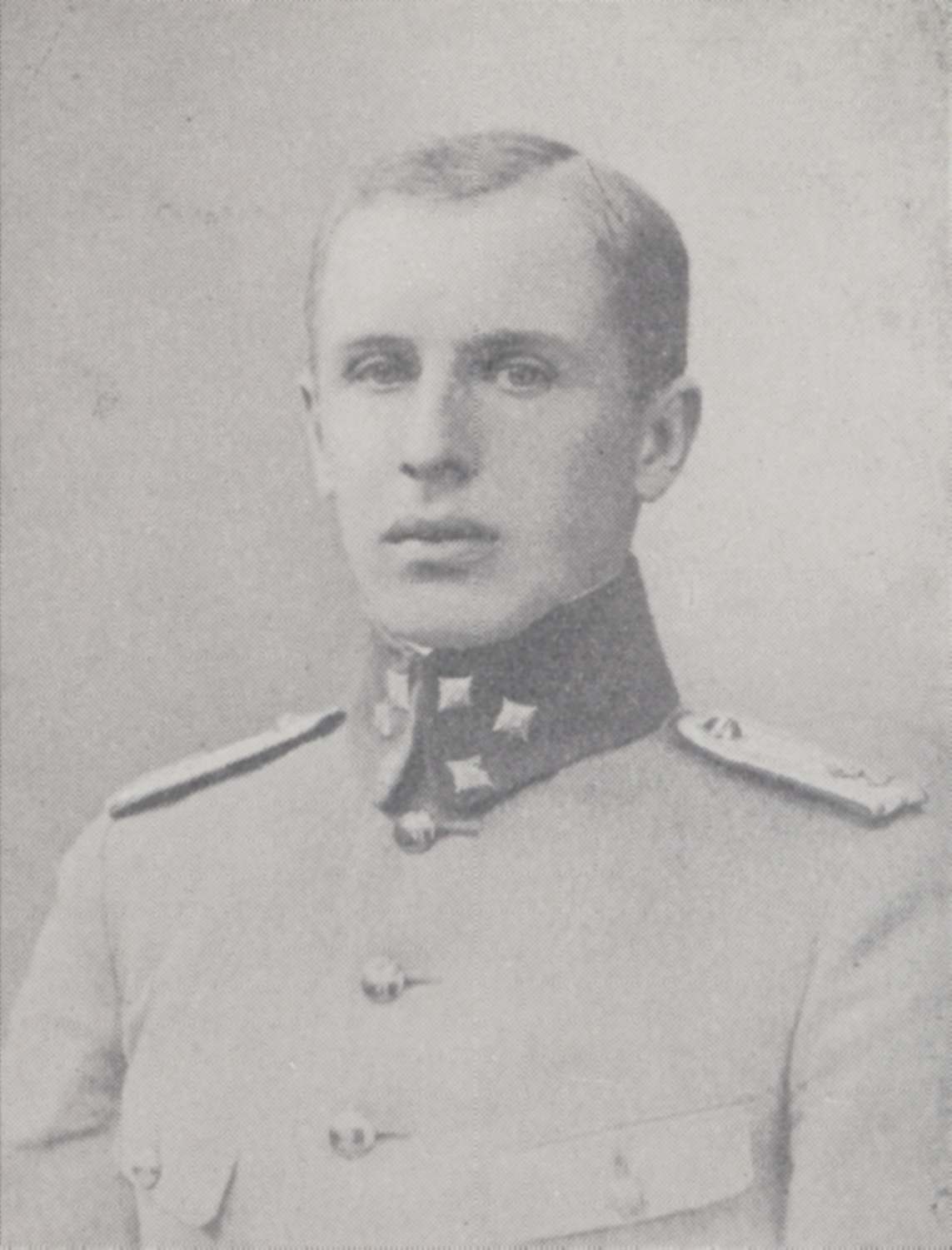 Description